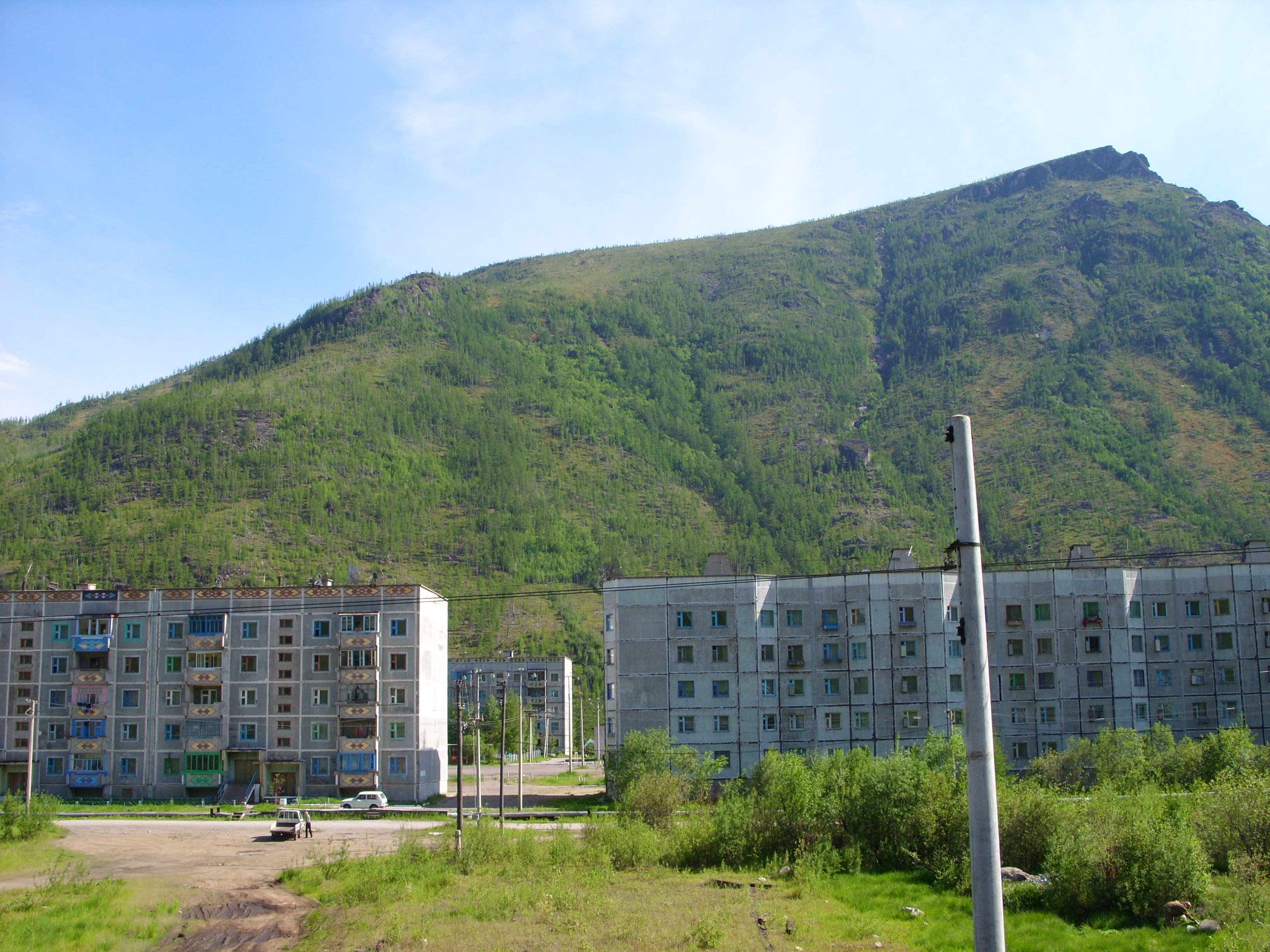 снимок 2009 г.